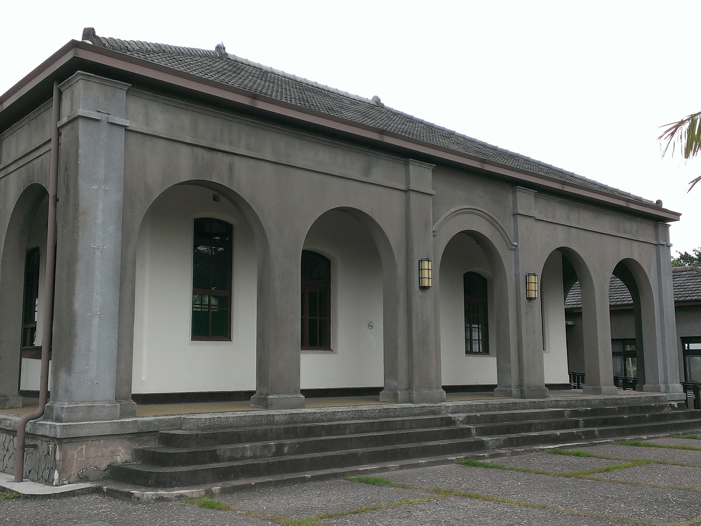 雲林縣歷史建築──原台灣三菱製紙所辦公廳舍